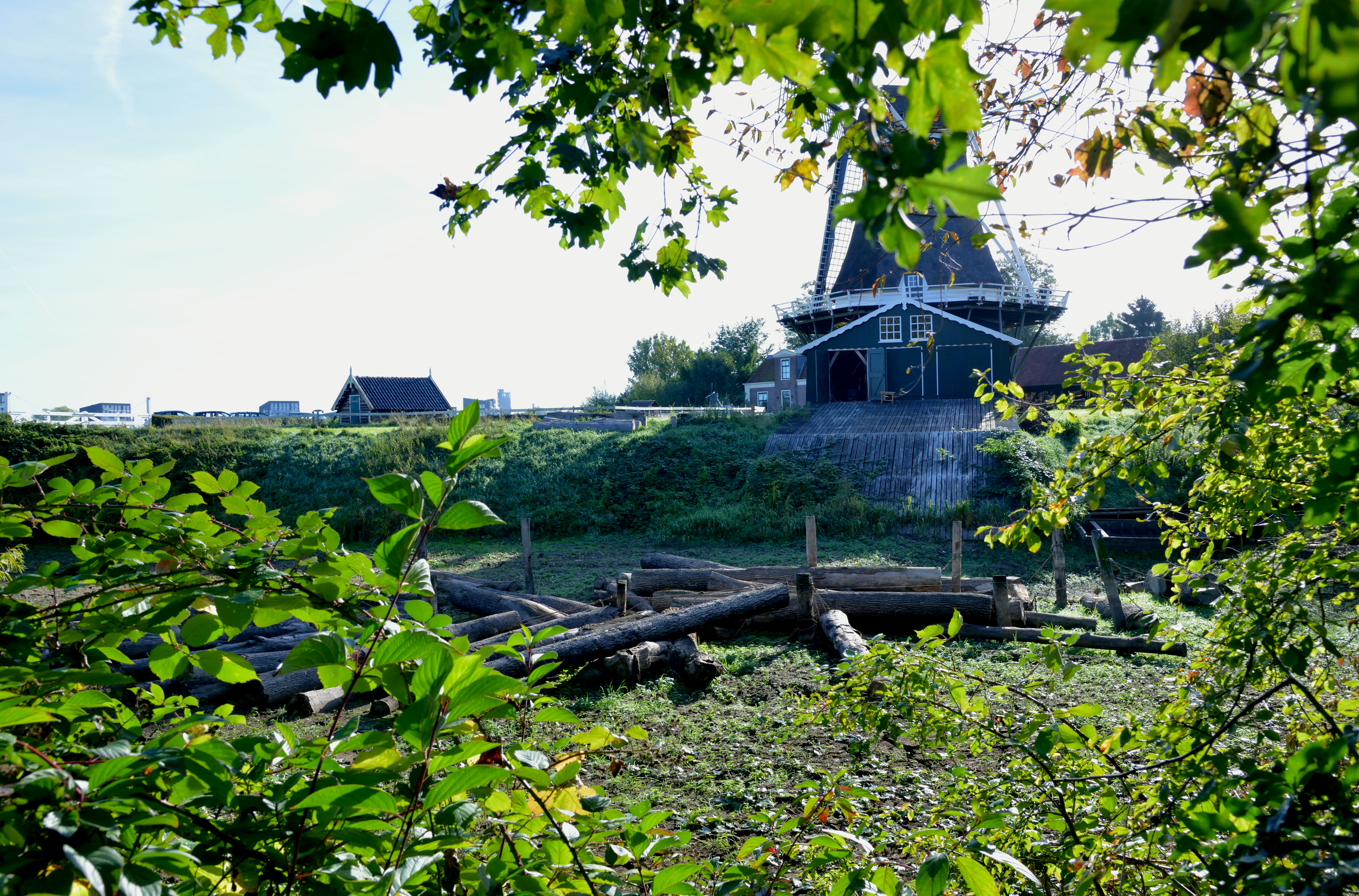 Bolwerksmolen, Deventer